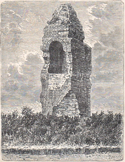 Pile romaine de Labarthe-Rivière, (Classé, 1905) .